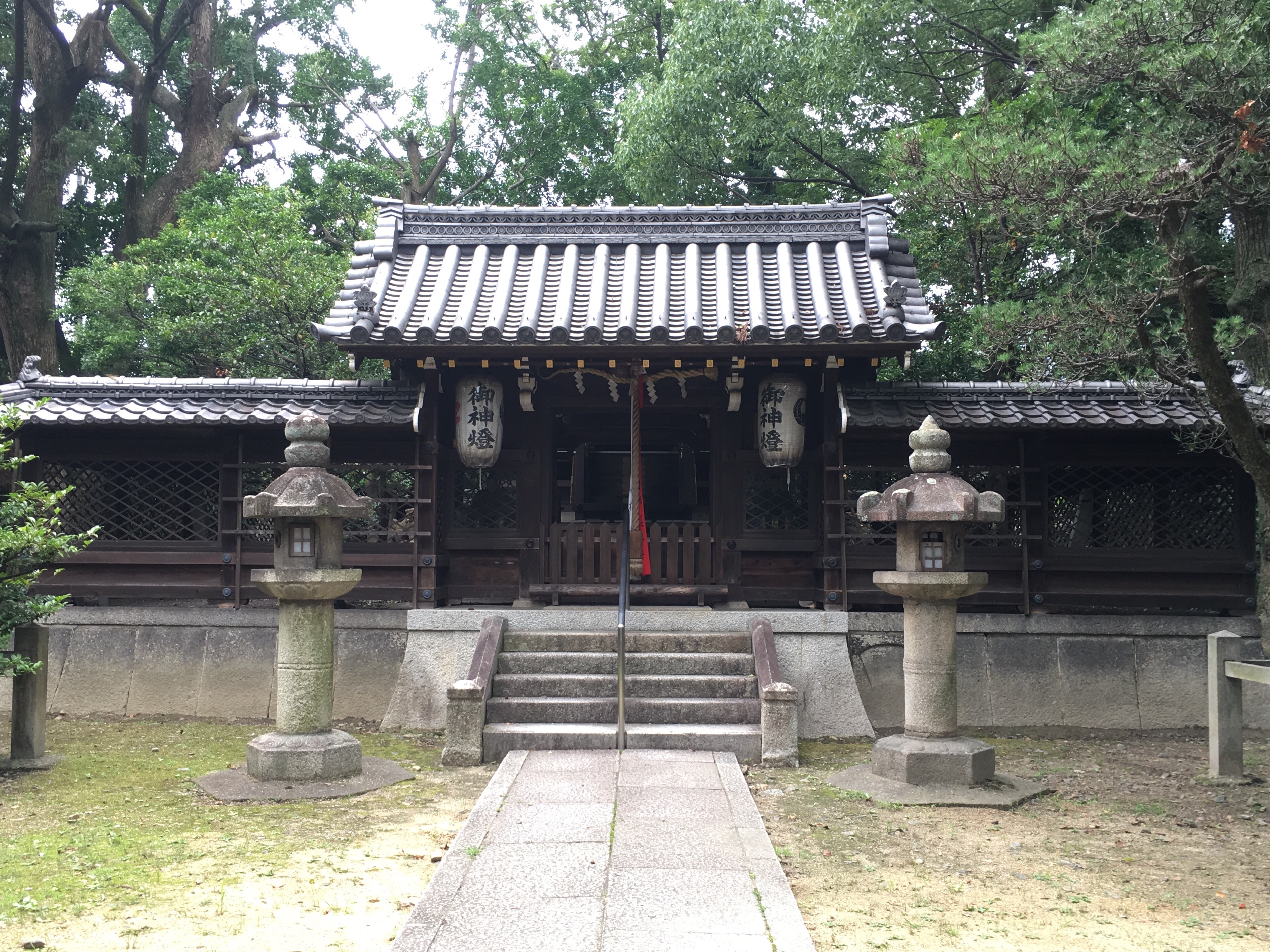 2019年7月、膳所神社で撮影。